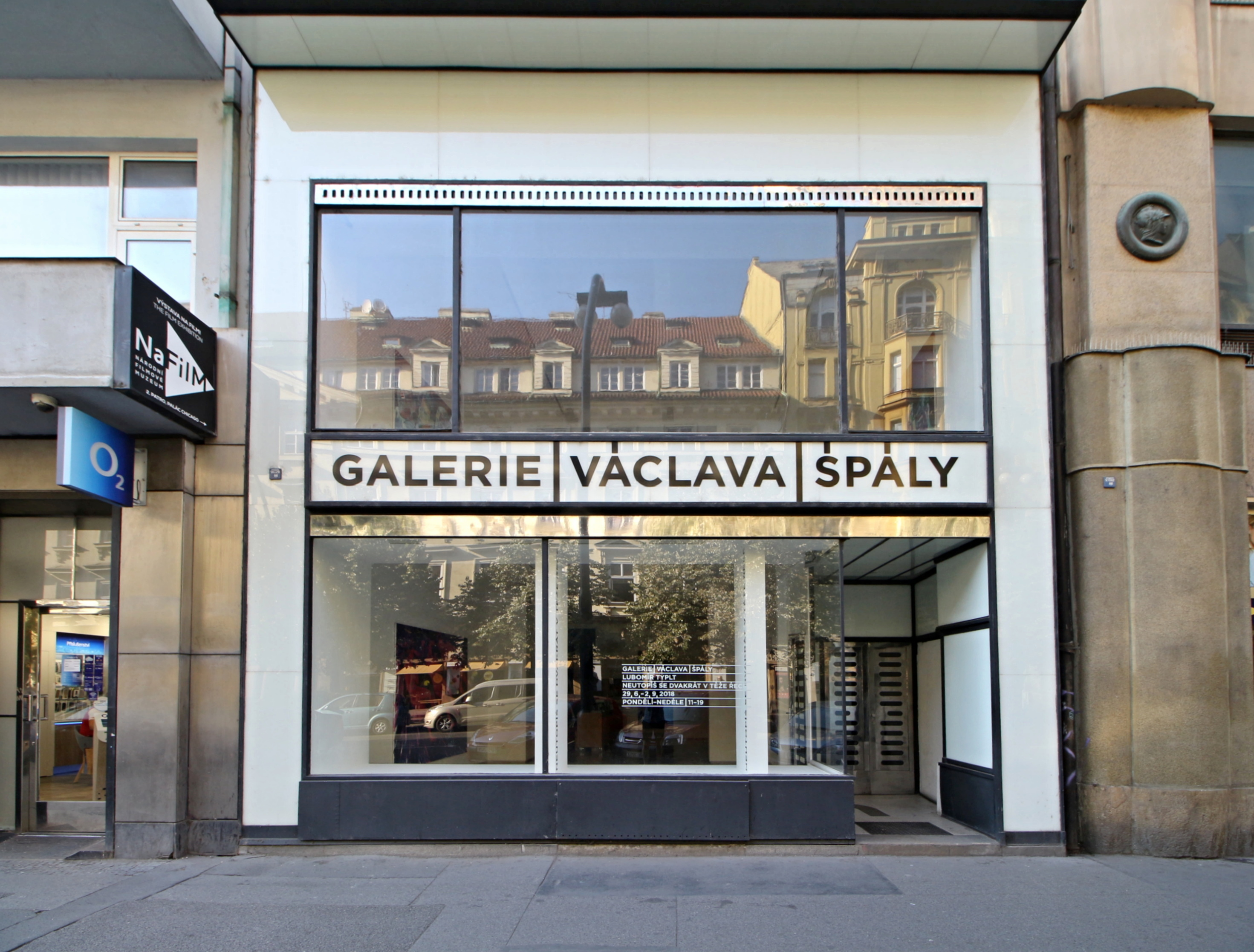 Praha, Národní, Galerie Václava Špály